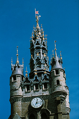 Flèche et carillon du beffroi de Douai (59). Cliché mis à disposition par le Comité de Tourisme du Nord et publiable moyennant mention du crédit